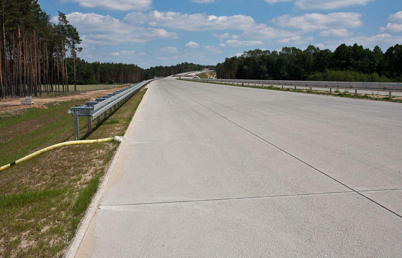 Autostrada A2. Widok ze skrzyżowania z drogą nr 3, koło Jordanowa, w kierunku zachodnim. Tam gdzie widać w oddali lampy zbliżamy się do skrzyżowania autostrady z realizowaną równolegle drogą ekspresową, która zastąpi wysłużoną drogę krajową nr 3. Droga łączy Szczecin z południem kraju.